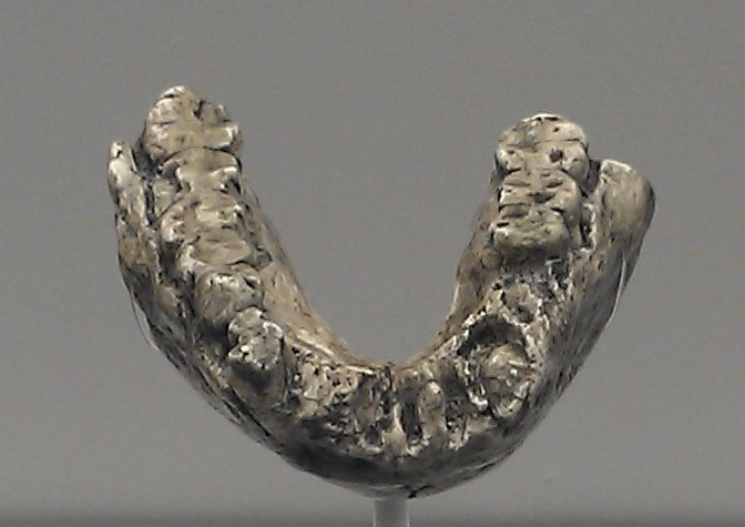 Mandíbula de Australopithecus afarensis, LH 4. Réplica Original: Laetoli (Tanzania) 3,6 millones de años Museo Nacional de Dar Es Salaam, Tanzania Réplica: Colección privada (Madrid) Exhibido en exposición temporal, "La cuna de la humanidad", en el Museo Arqueológico de Regional de Madrid